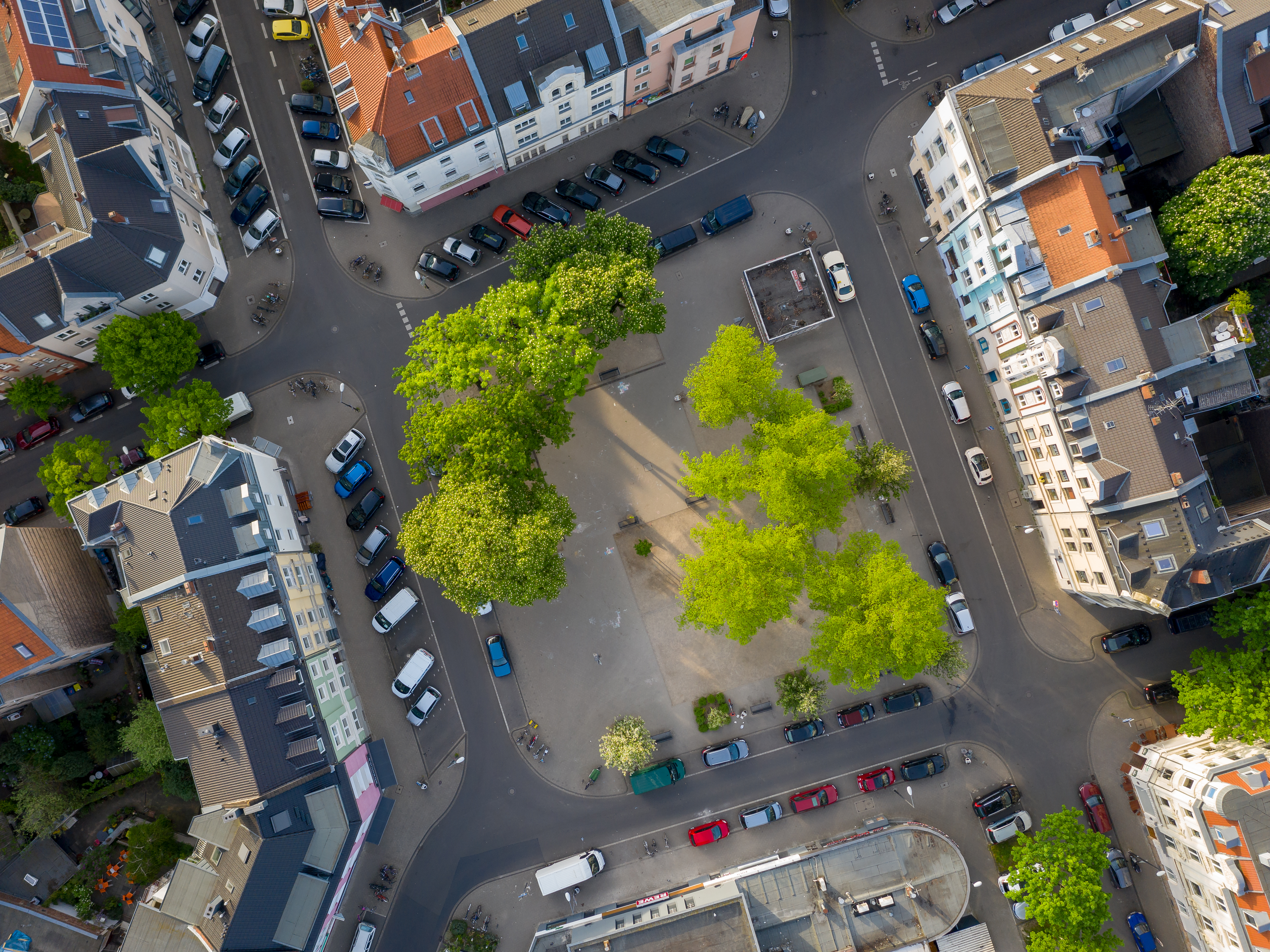 Lenaupatz in Köln, senkrecht aus der Luft